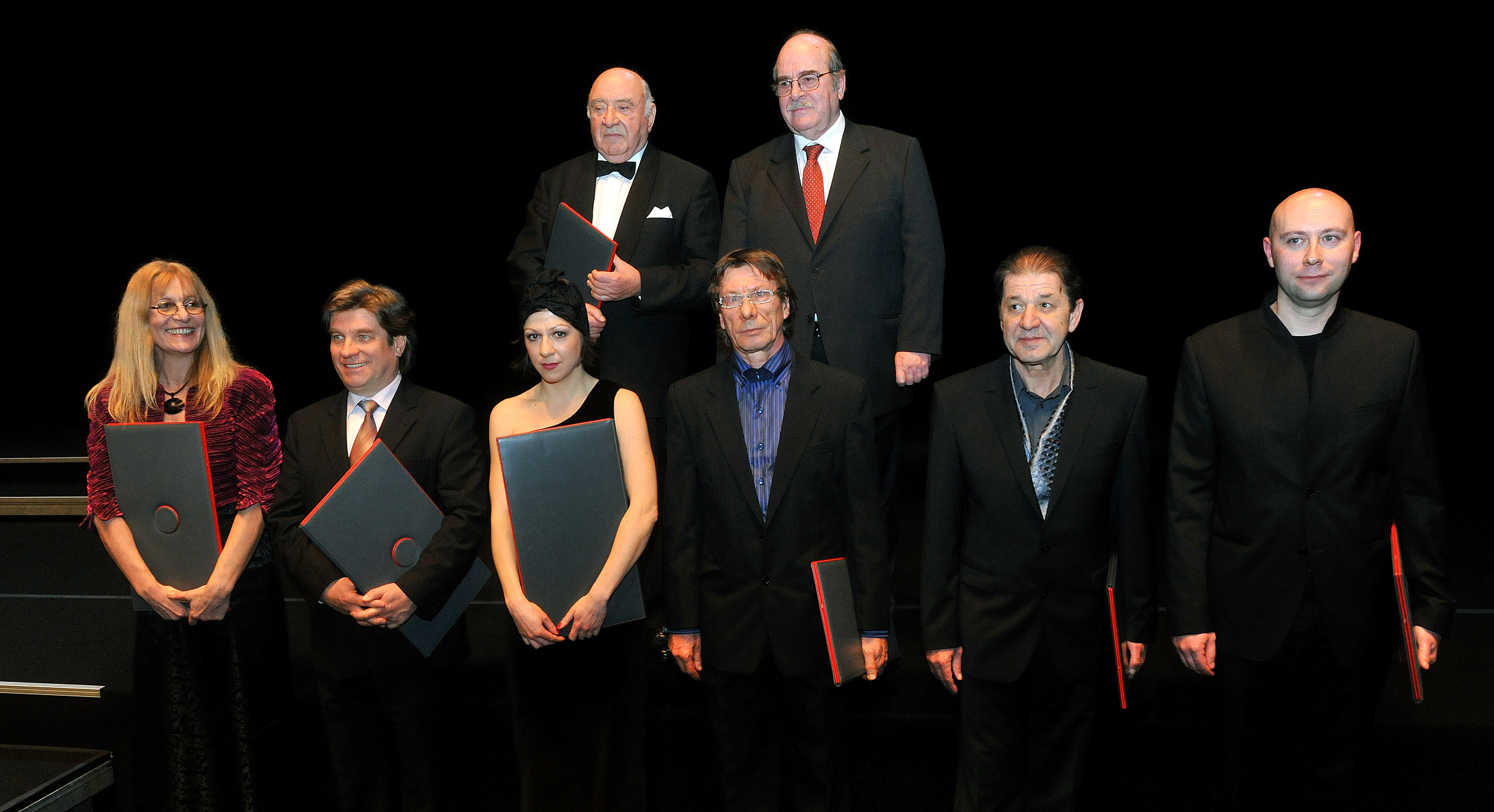 Prešernovi nagrajenci: Anton Nanut, Miroslav Košuta, Lilijana Praprotnik Zupančič, Branko Robinšak, Janja Majzelj, Zlatko Kaučič, Emil Filipčič, Jure Miklavc